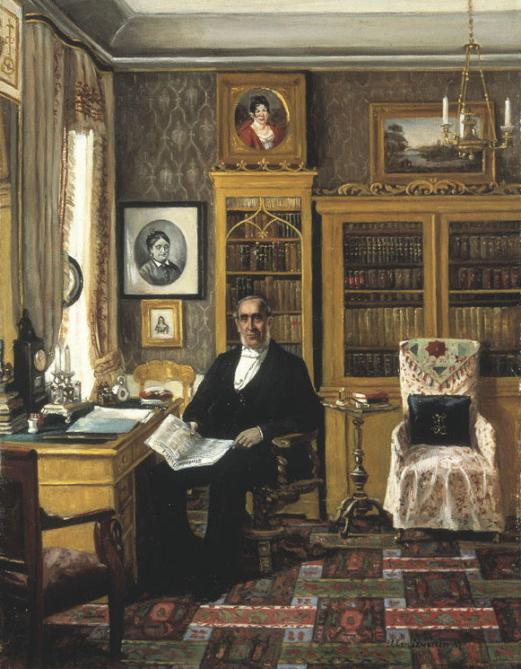 Interiör från Skeppsbron 44. Porträtt av med.dr. Jacob Levertin, far till Ellen Levertin och ägare till huset Skeppsbron 44